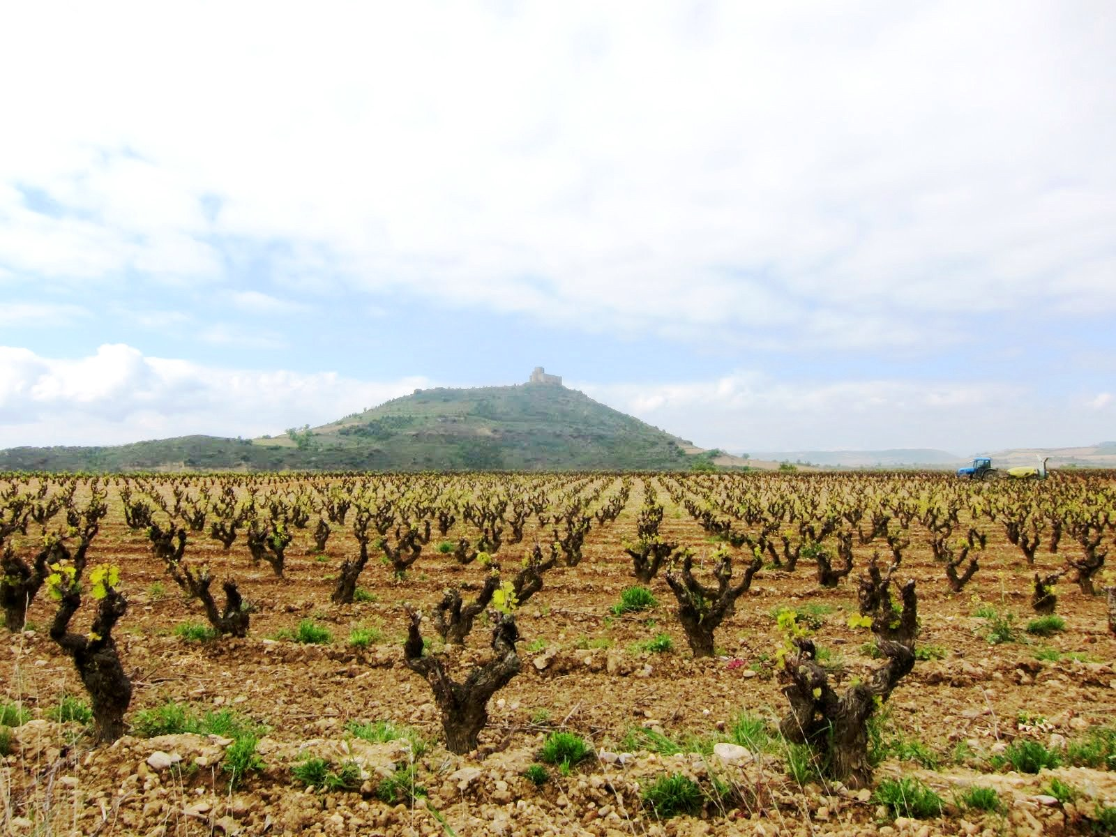 A Rioja Vineyard